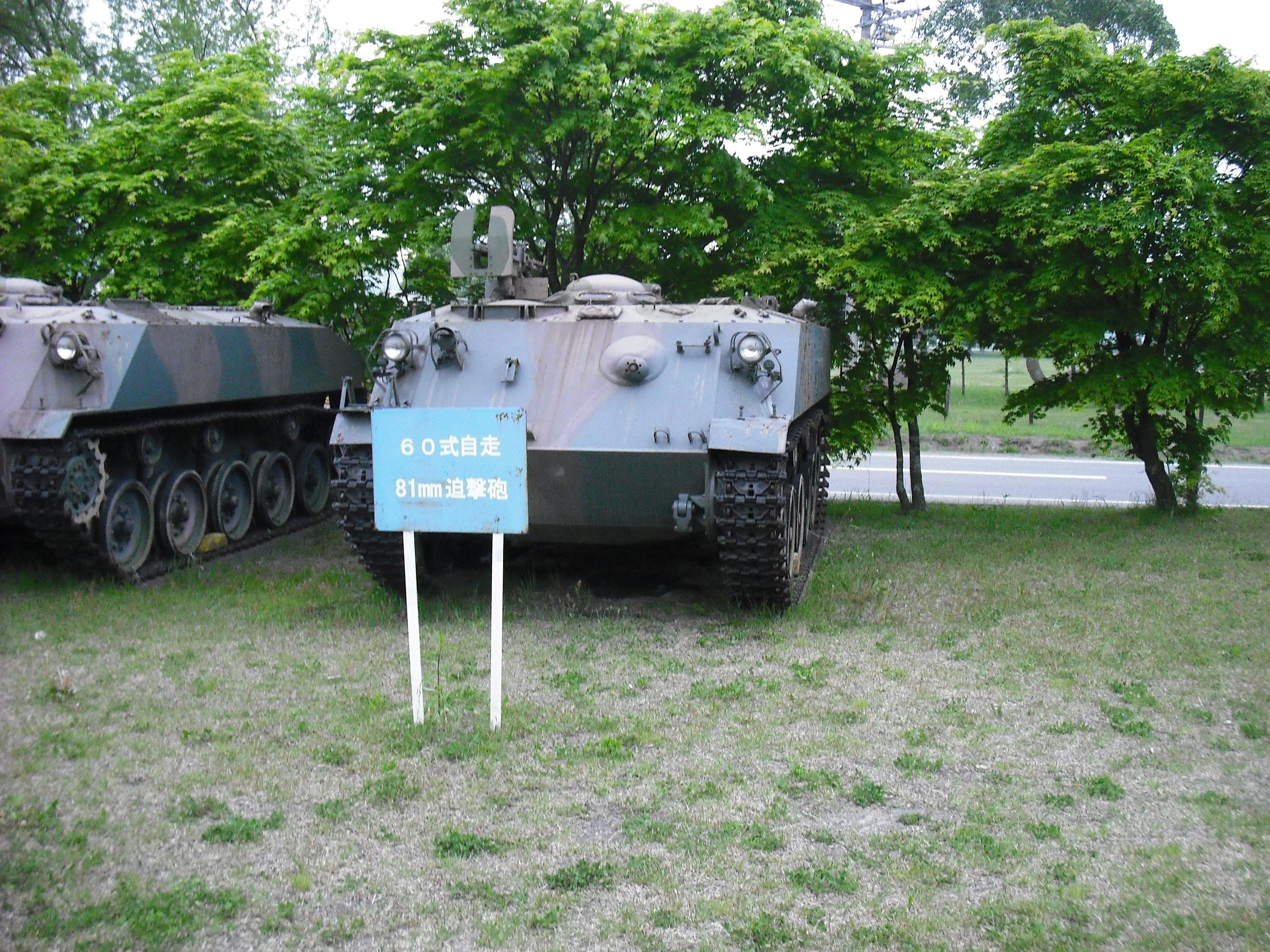 東千歳駐屯地資料館